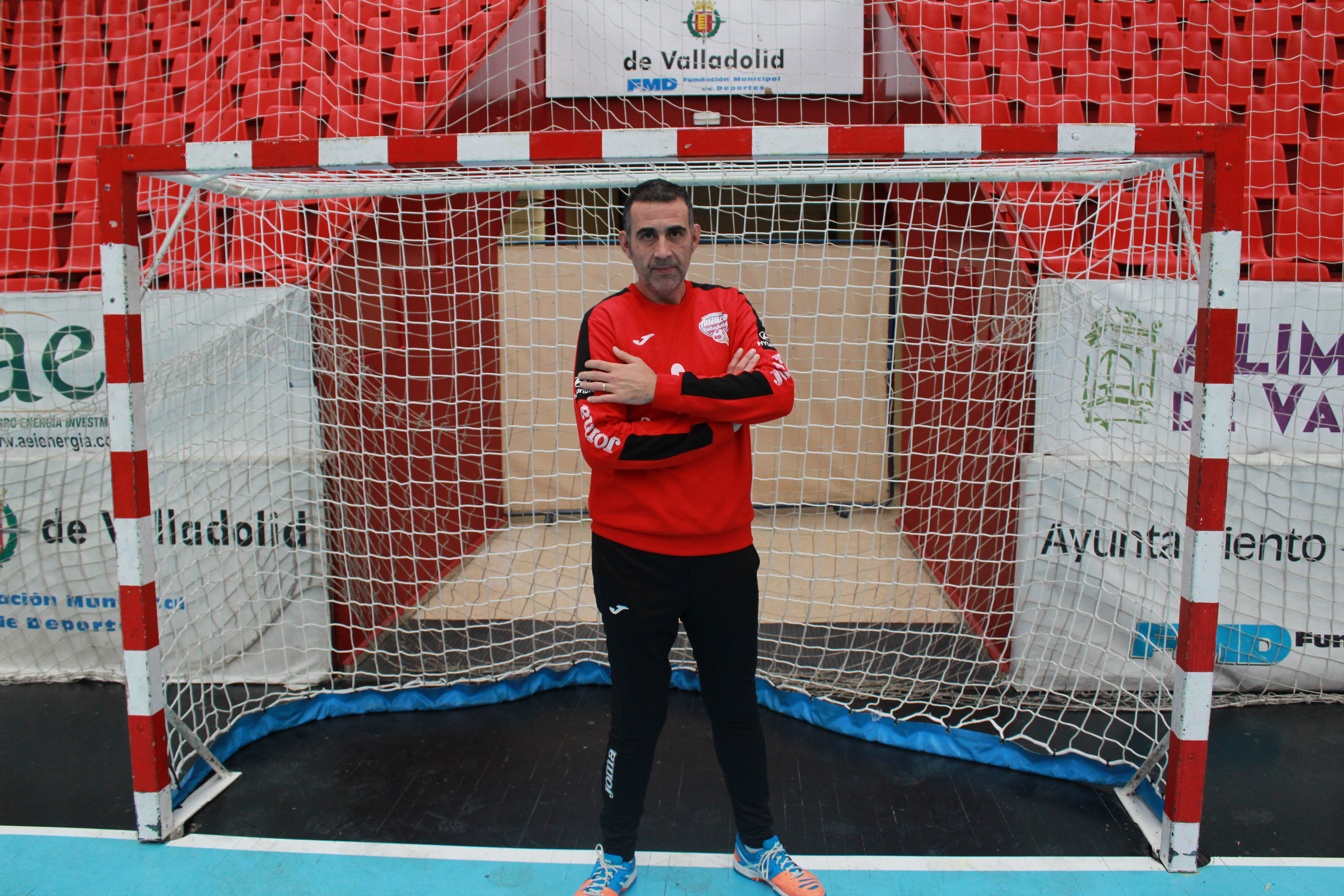 Imagen de David Pisonero, exjugador y entrenador vallisoletano de balonmano